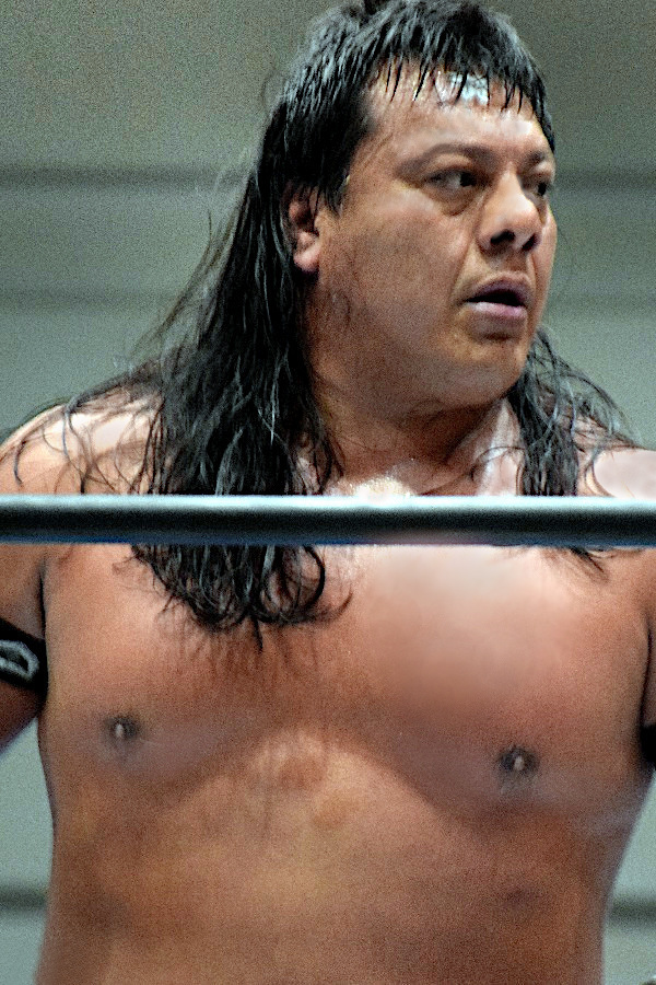 2017年1月13日 大阪府立体育会館・第二競技場「CMLL FANTASTICA MANIA 2017」 ウルティモ・ゲレーロ